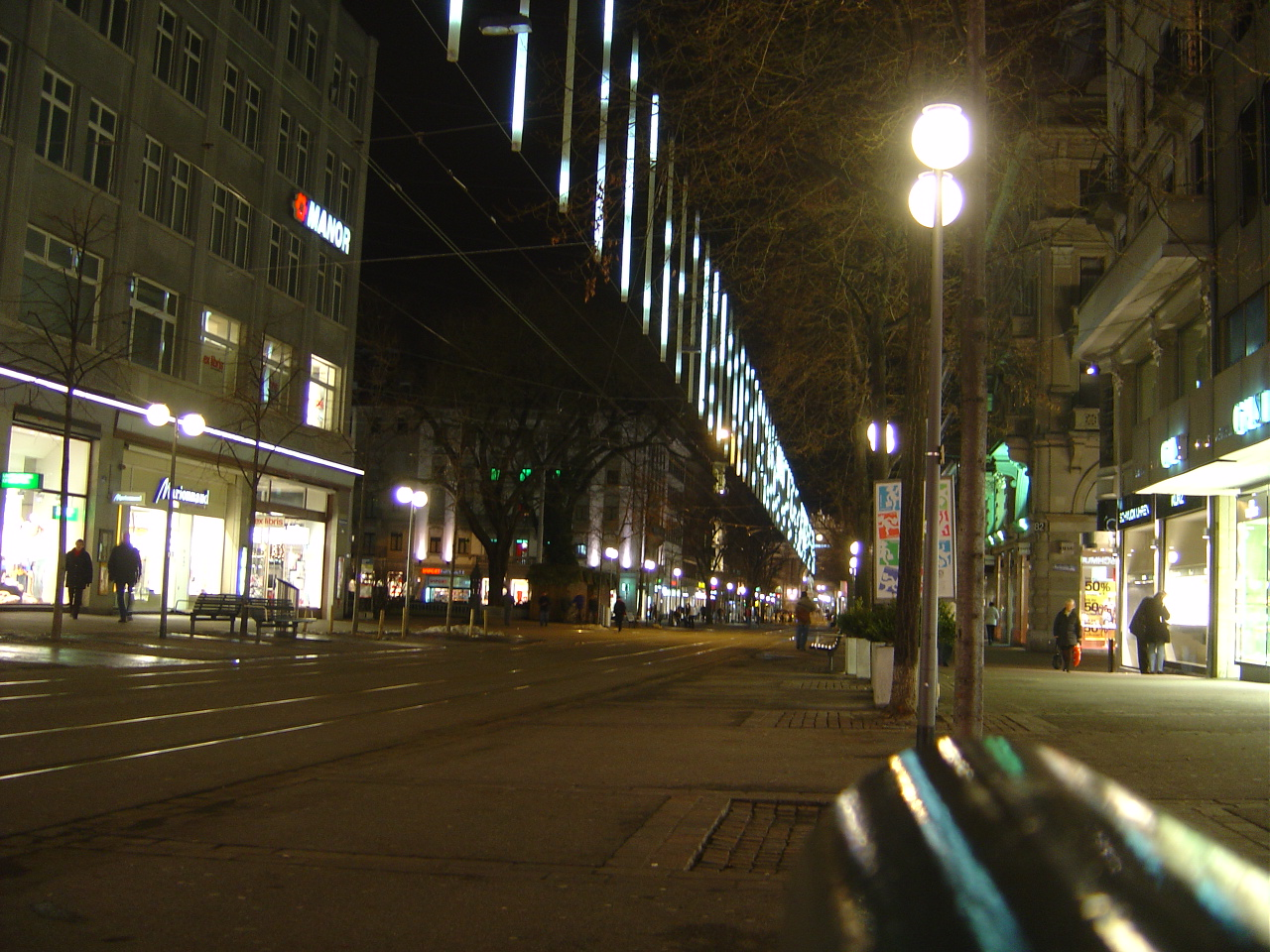 蘇黎世車站大街夜景。